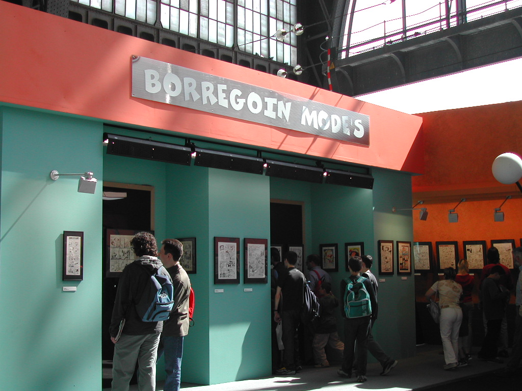 Vistas generales de la exposición del Salón del Cómic de Barcelona dedicada a la obra de Jan en 2003.